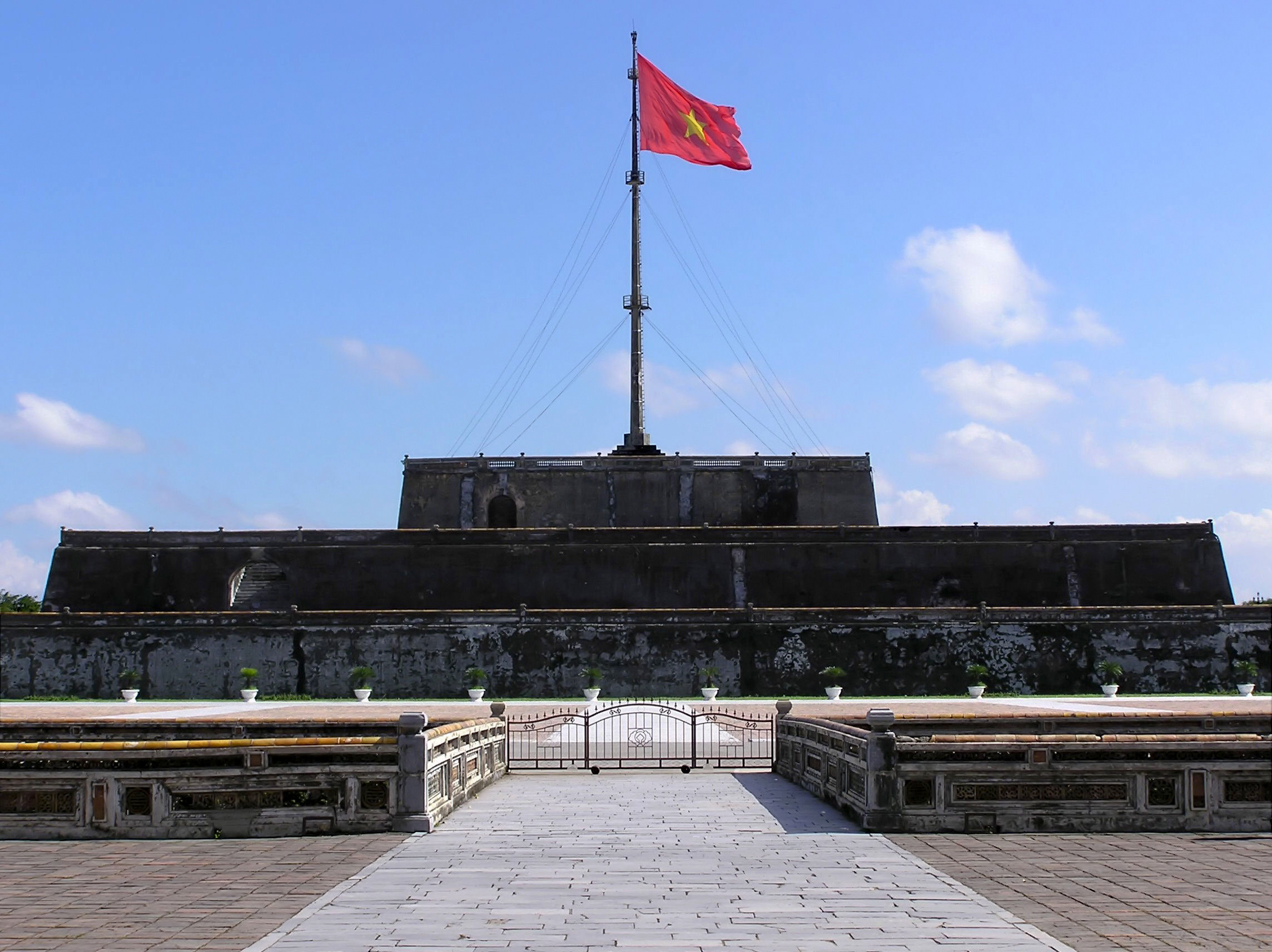 La tour du Drapeau (Ky Dai) devant l'entrée de la citadelle de Hué - Vietnam